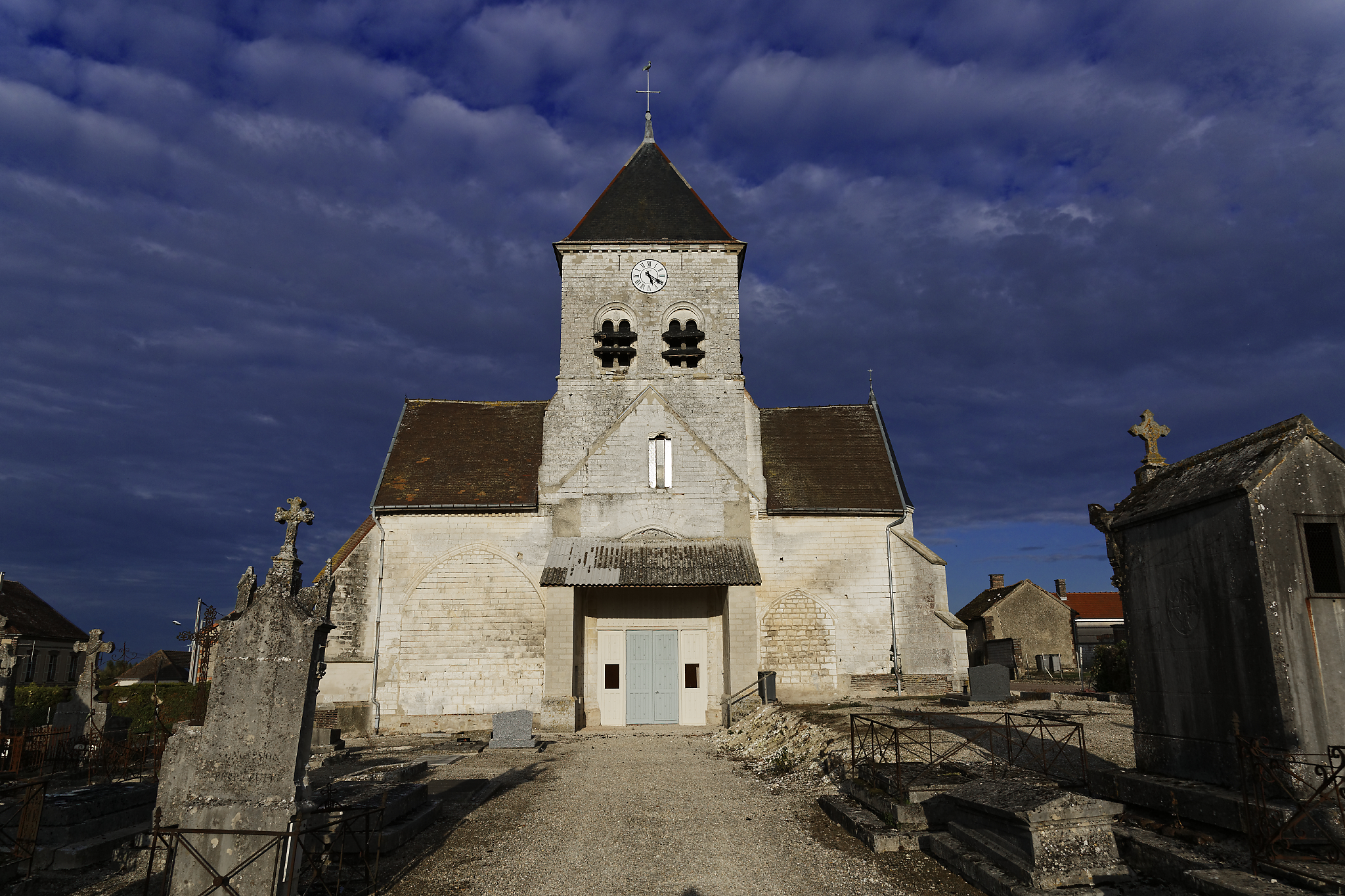 Église Saint-Pierre-Saint-Paul